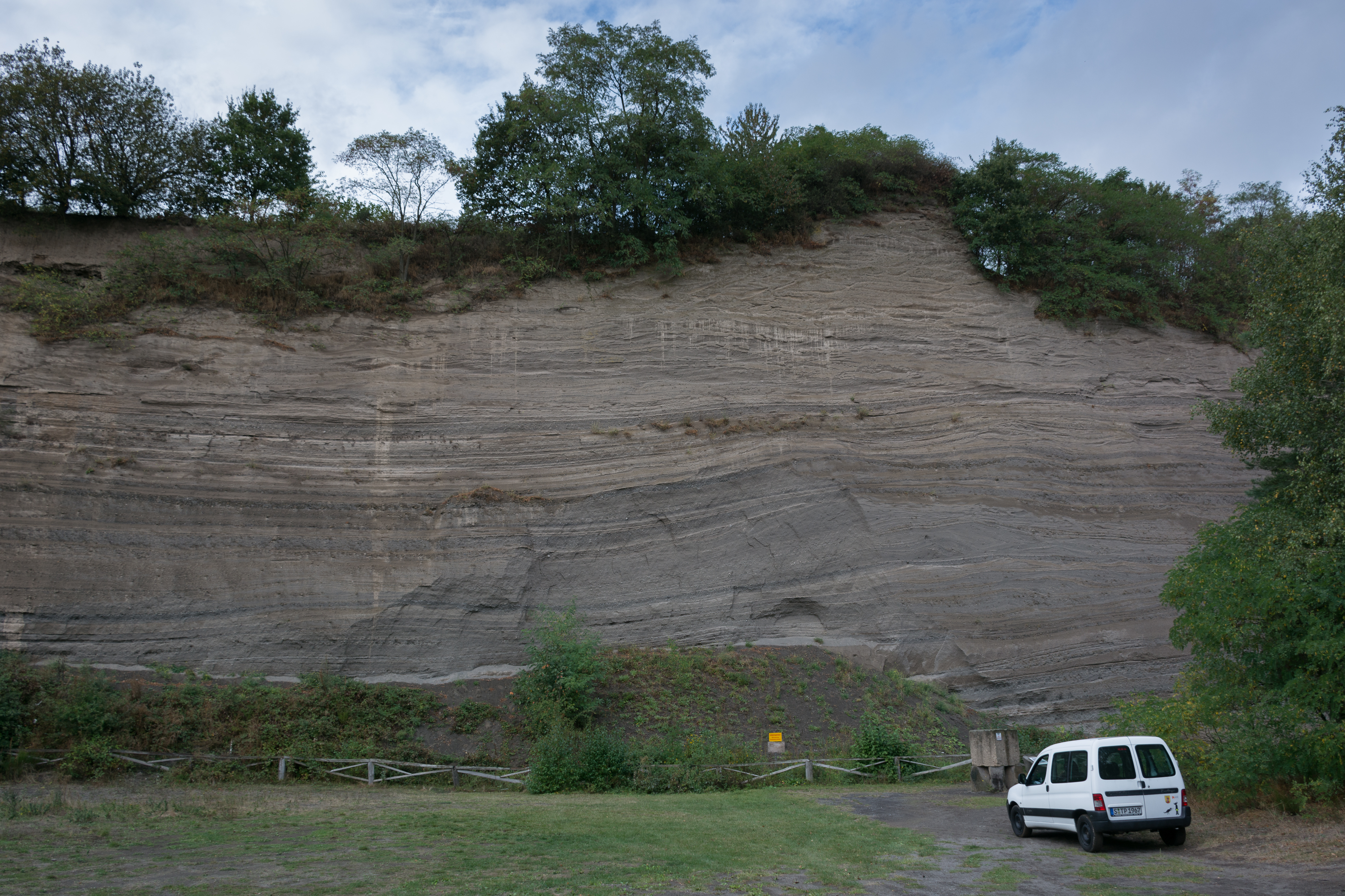 Die Wingertsbergwand bei Mendig.